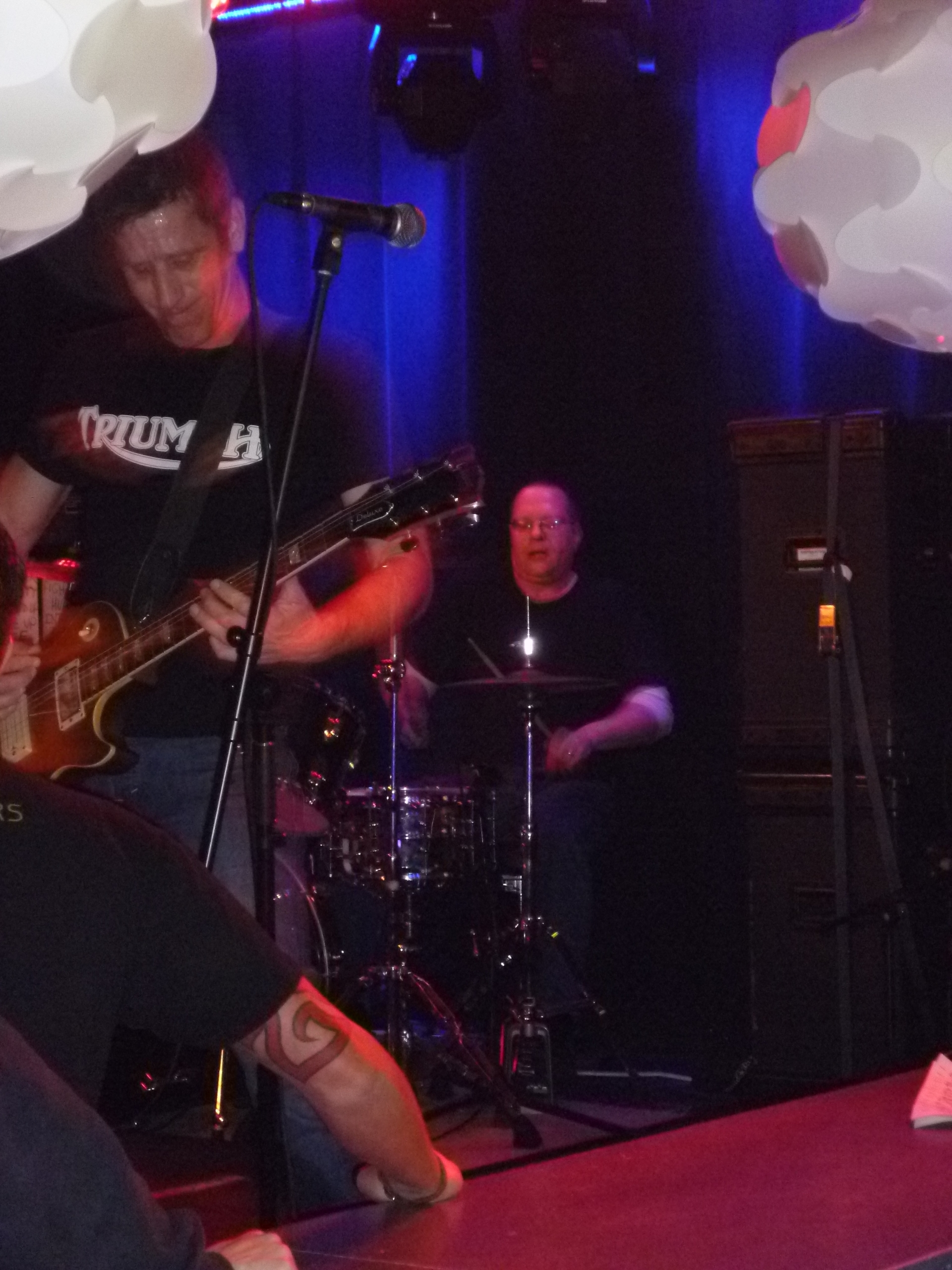 Franz Stahl and Kent Stax of Scream live im Kleinen Klub (Saarbrücken)